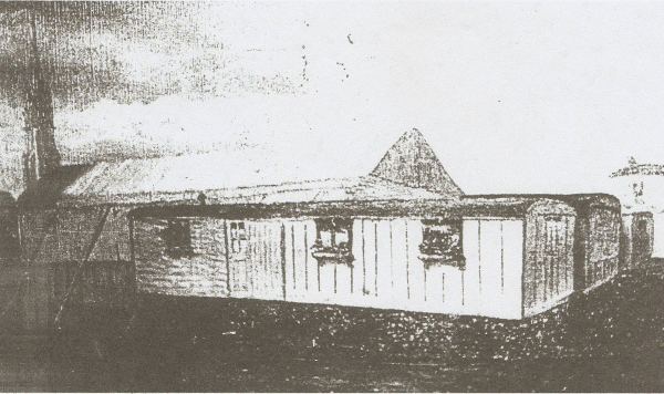 Peinture représentant au fond le théâtre des Créteur, au premier plan les Caravanes ou Monique Créteur naquit le 26 Août 1931